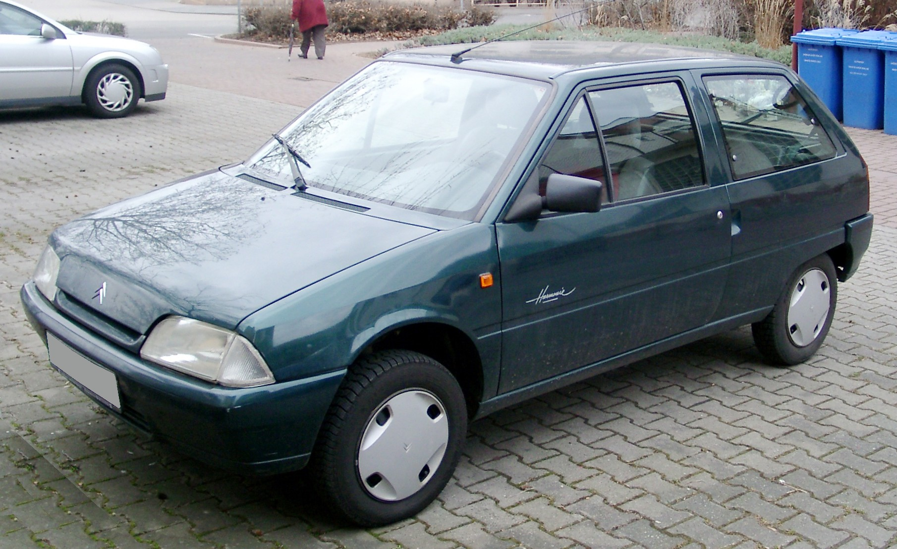 Citroën AX